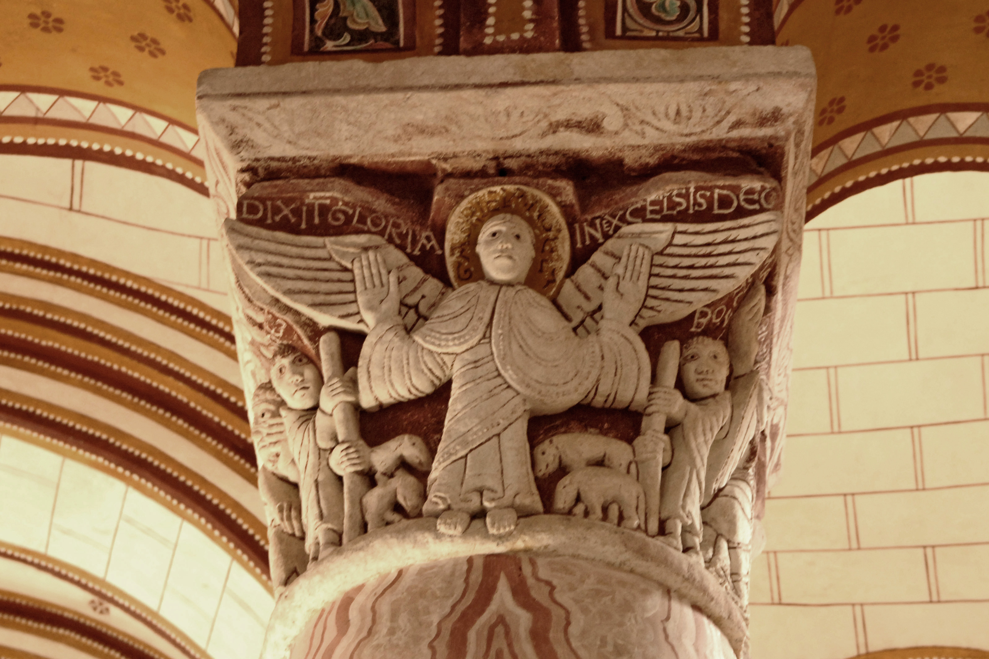 Kapitell II